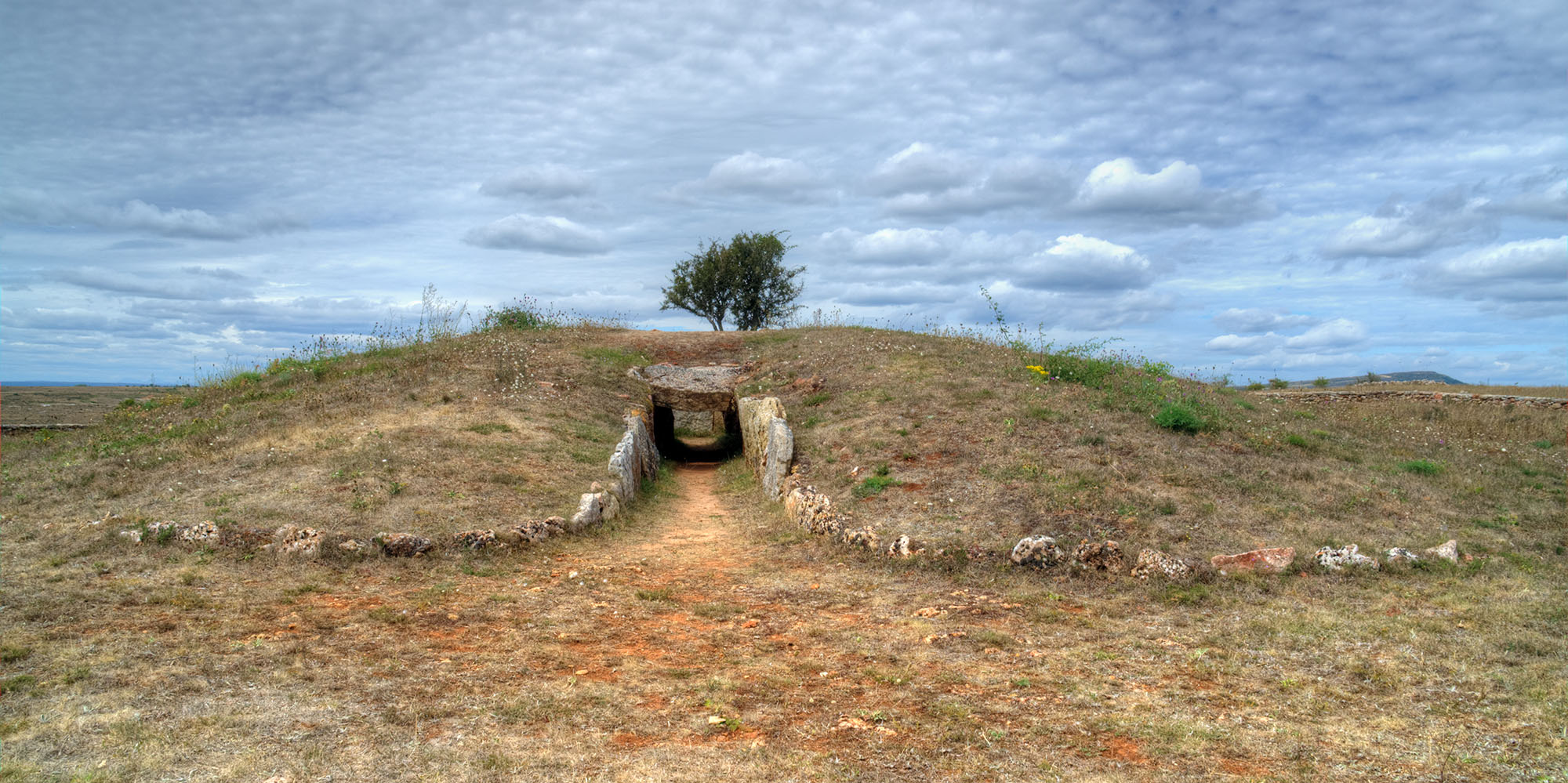 Aislado en el páramo de Sedano y Masa, en el norte de Burgos, el dolmen conserva buena parte del túmulo, el corredor cubierto y los ortostatos de la cámara.